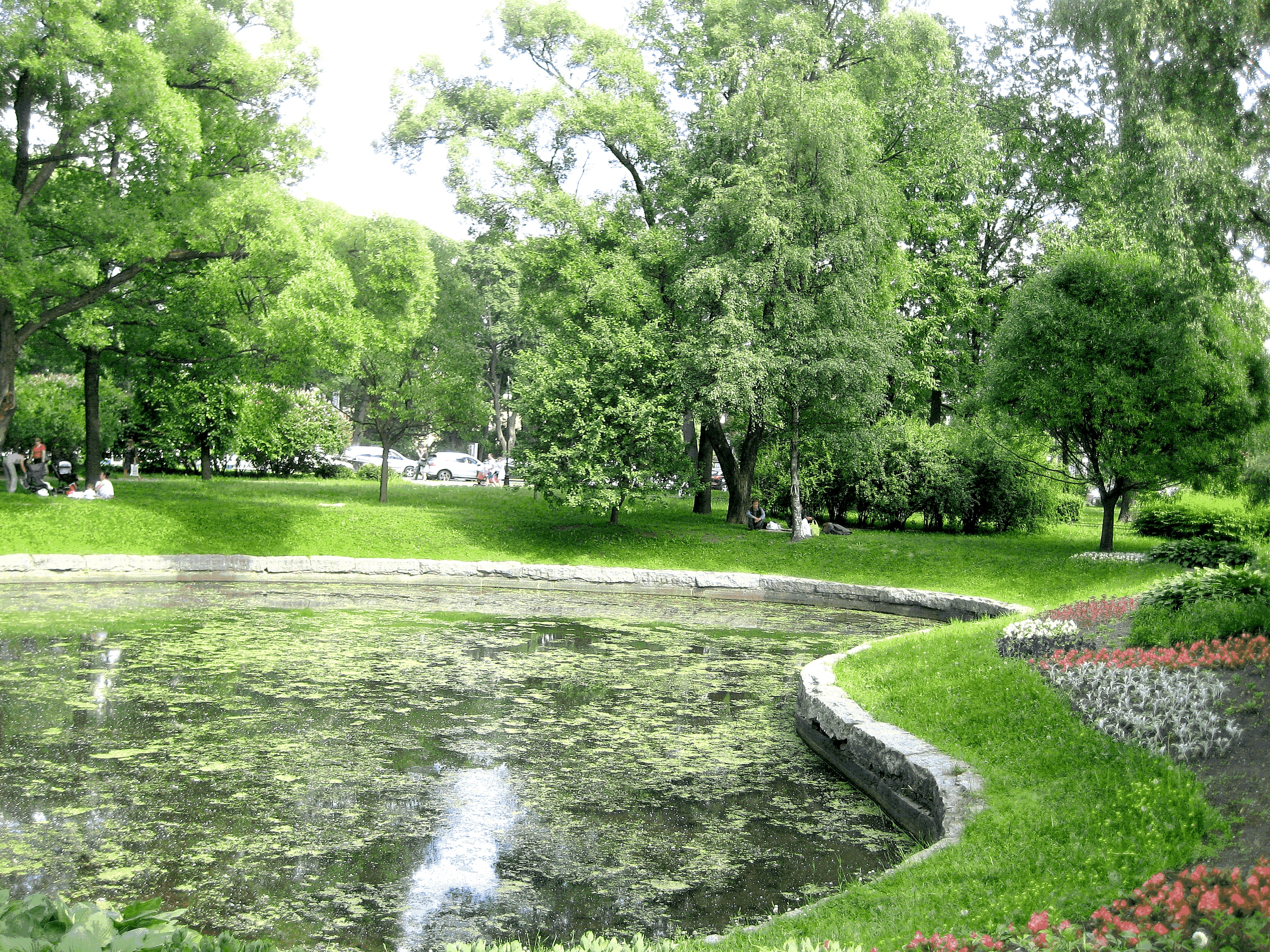 Санкт-Петербург. Александровский парк